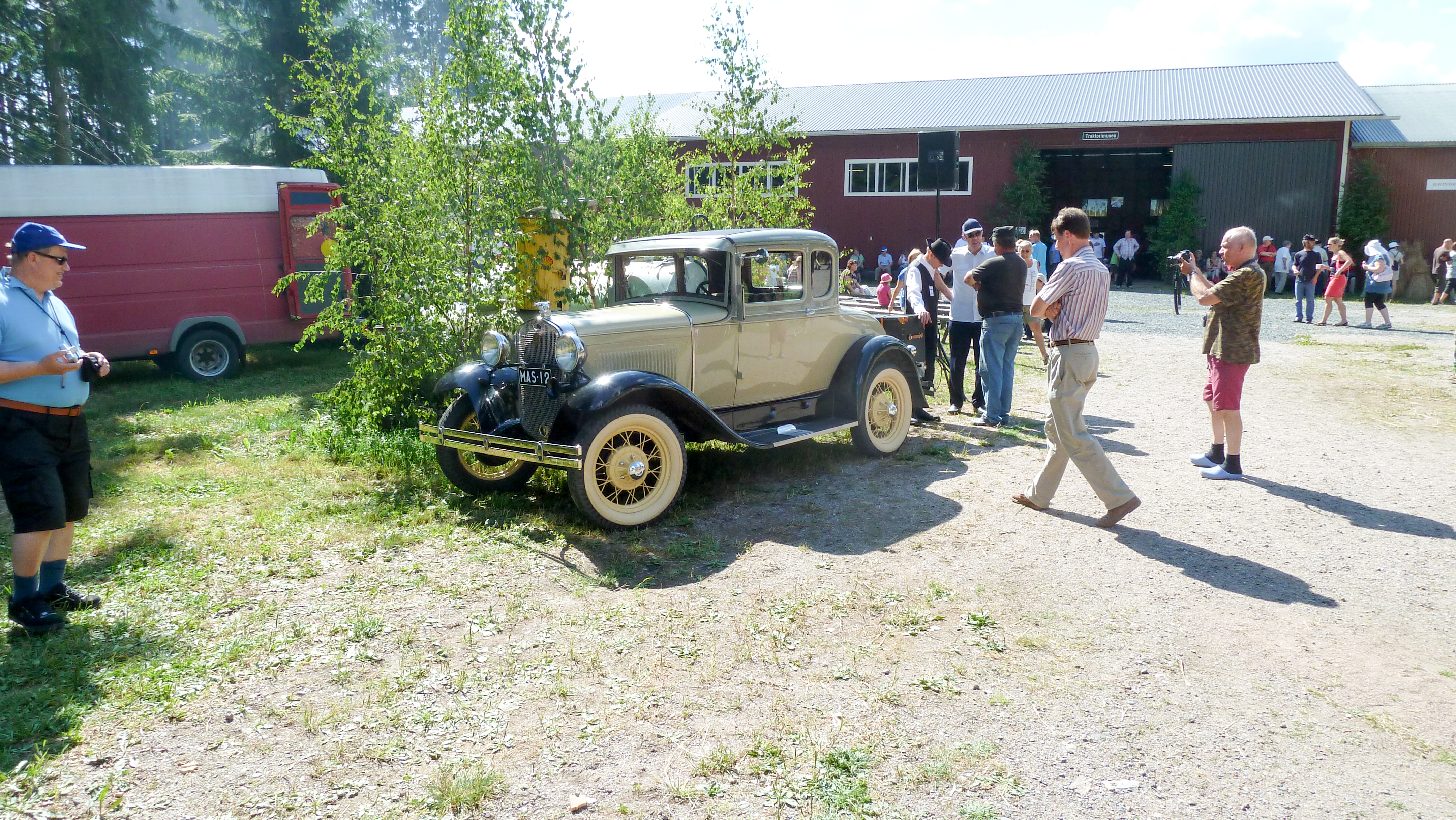 Ol Hollilla päivä Mäkilän traktorimuseolla vuonna 2010